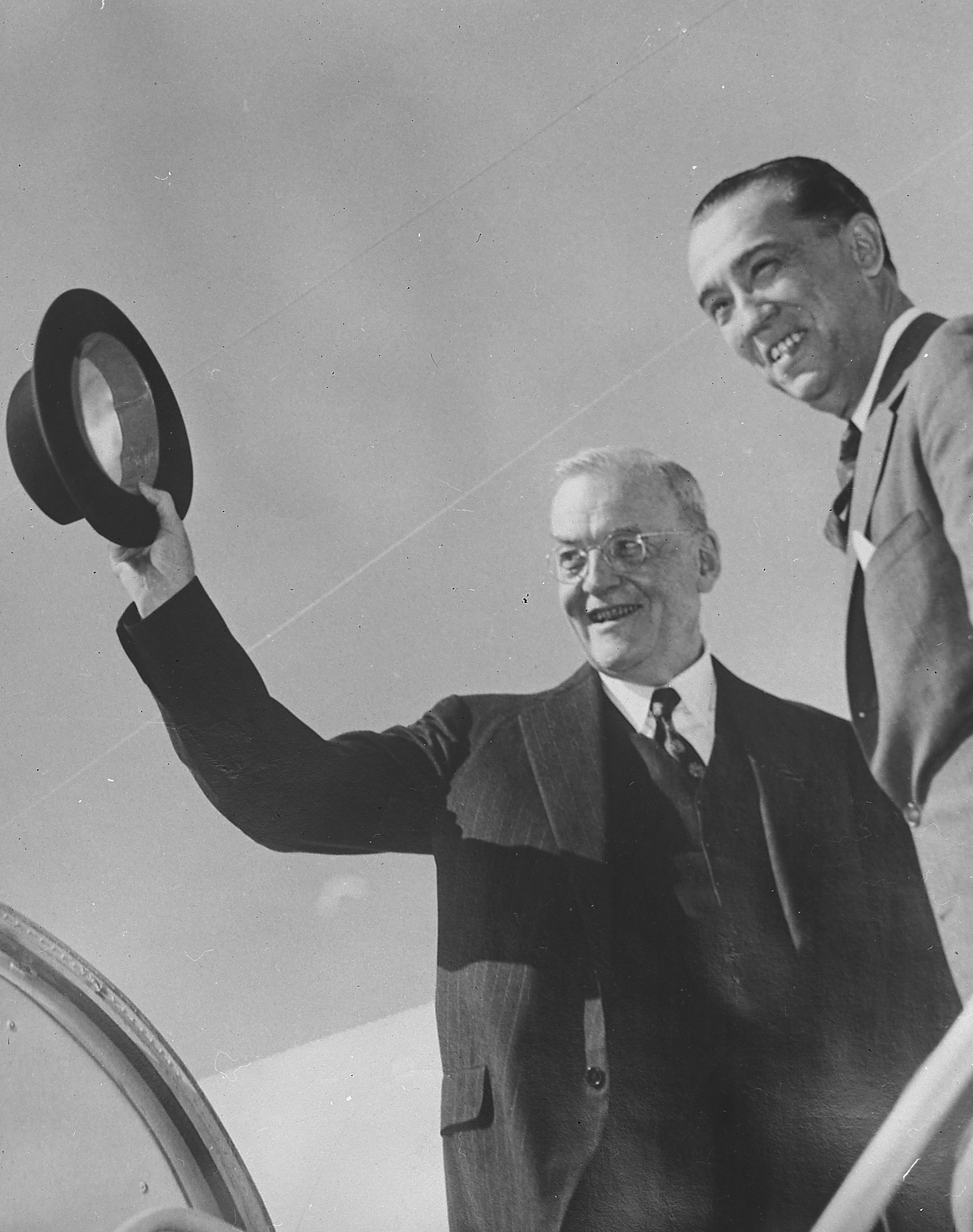 Imagem do Fundo Agência Nacional, do Arquivo Nacional